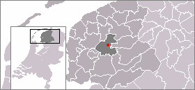 Kaart met de locatie van Grou, gemaakt uit sjabloon van Wikipedia-gebruiker Mtcv